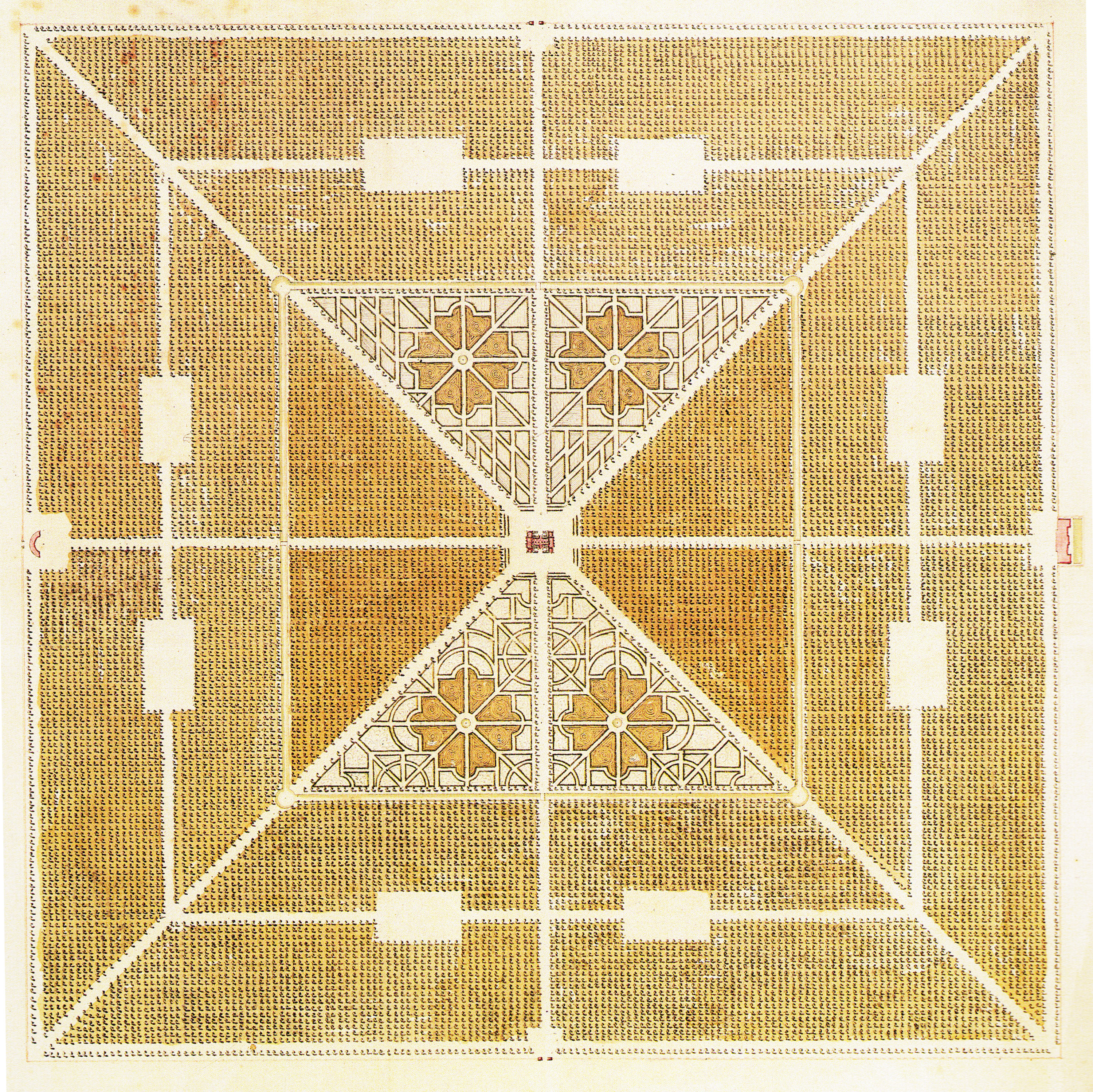 Der älteste Plan des Großen Gartens, Dresden. Wohl um 1683.